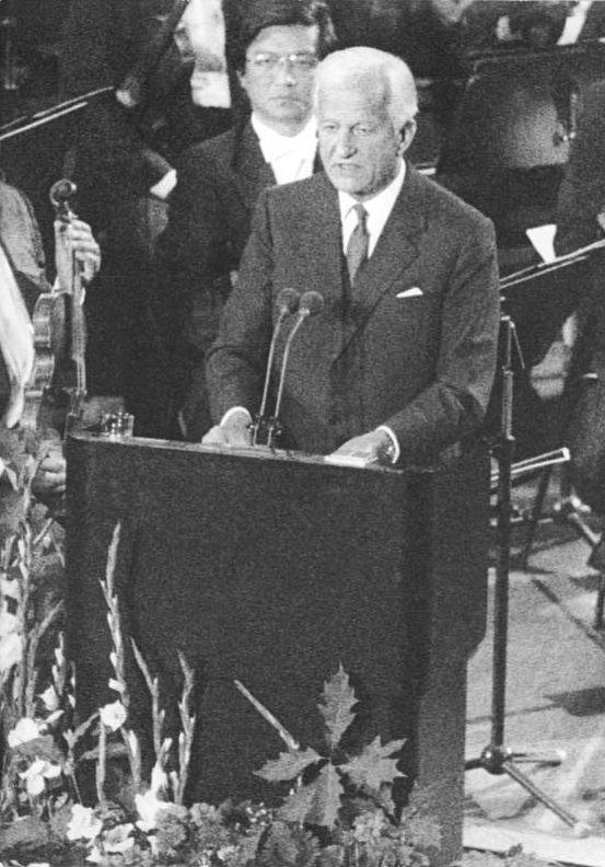 ADN-Peer Grimm -3.10.90 Berlin: Vereinigung Ein Staatsakt zum Tag der Deutschen Einheit fand in der Berliner Philharmonie statt. Auf der festlichen Zusammenkunft ergriff auch Bundespräsident Dr. Richard von Weizsäcker das Wort.